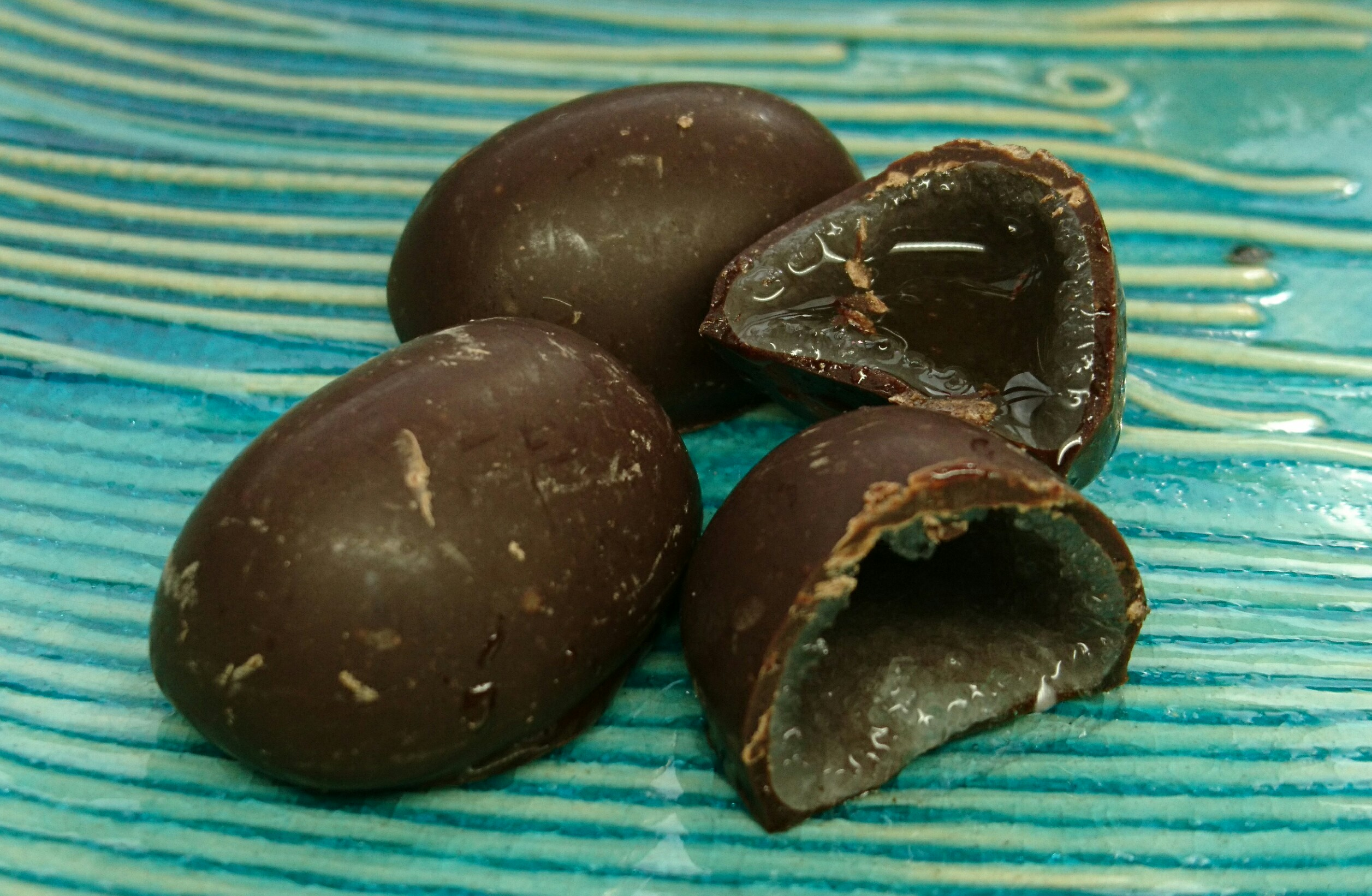 木下酒造「タイムマシーン1712」を使用した菓子